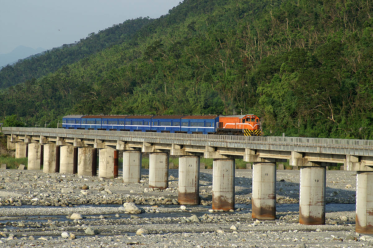 臺灣鐵路管理局柴電機車牽引藍皮普通車。